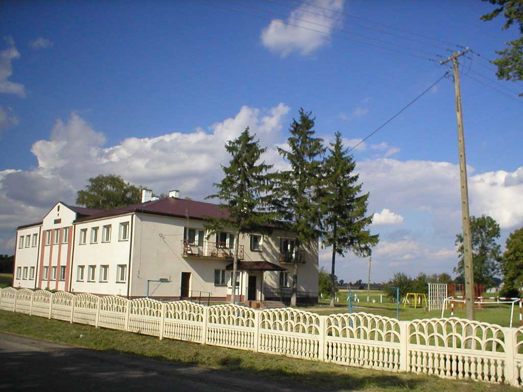 Czerniczyn - nowa szkoła